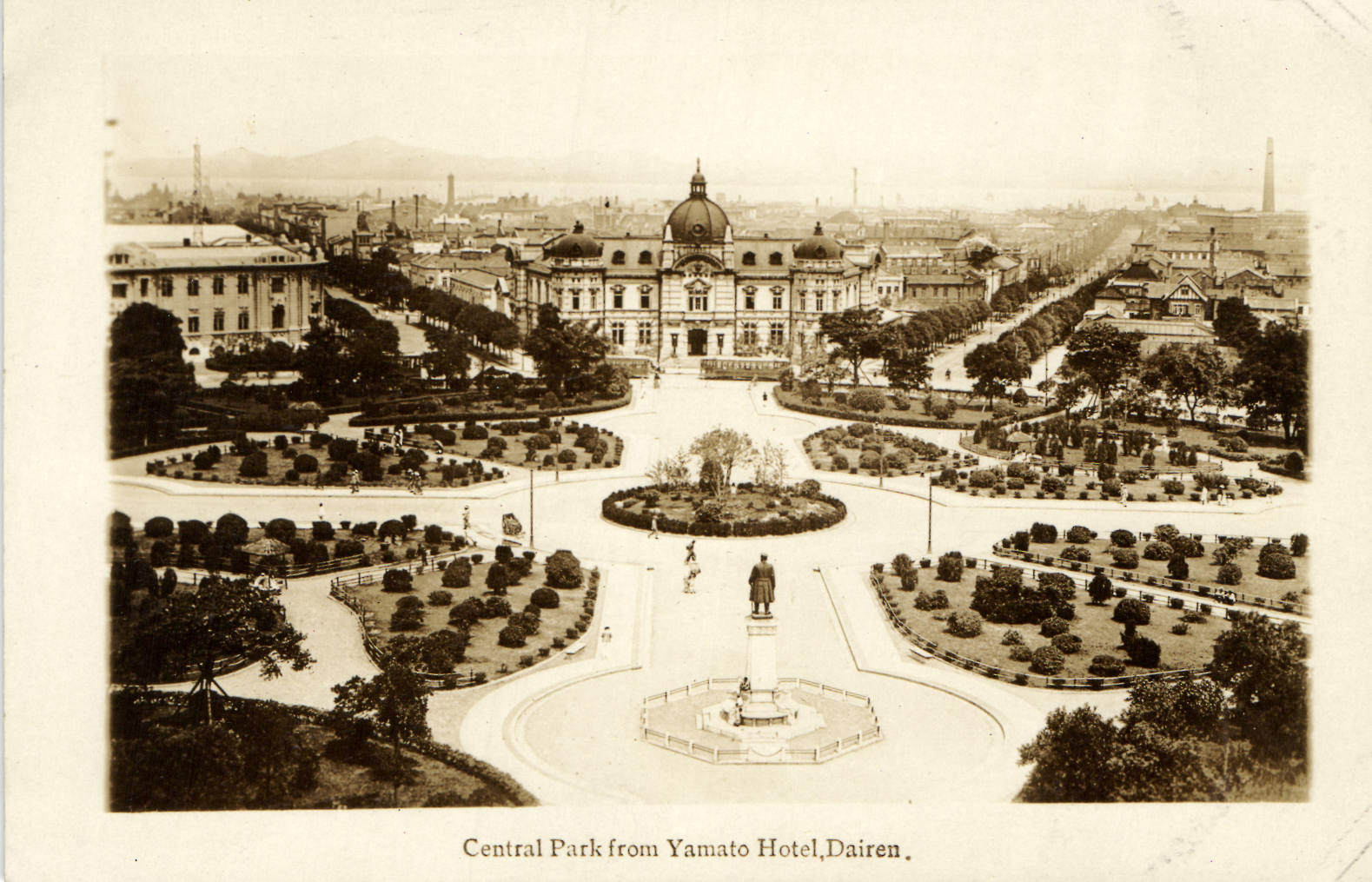 大连中山广场旧照，自大和旅馆拍摄